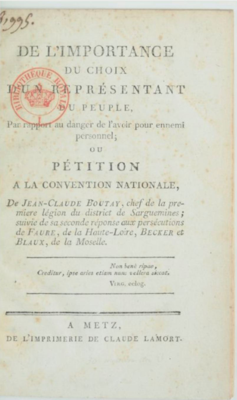 Couverture de la publication "De l'importance du choix d'un représentant du peuple, par rapport au danger de l'avoir pour ennemi personnel ; ou Pétition à la Convention nationale de Jean-Claude Boutay, chef de la première légion du district de Sarguemines ; suivie de la seconde réponse aux persécutions de Faure, de la Haute-Loire, Becker et Blaux, de la Moselle"